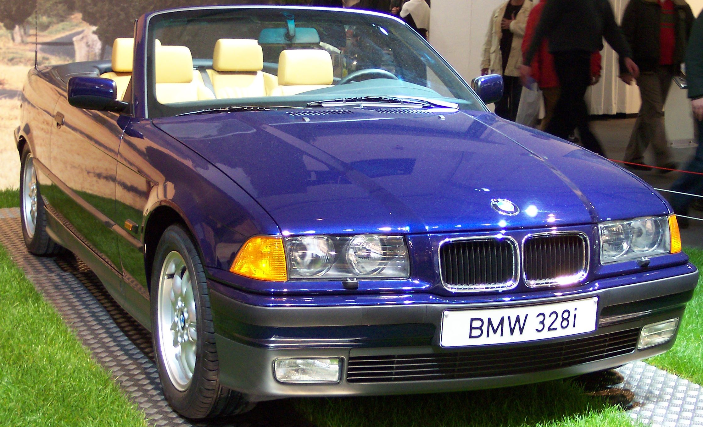 BMW 328i 1996